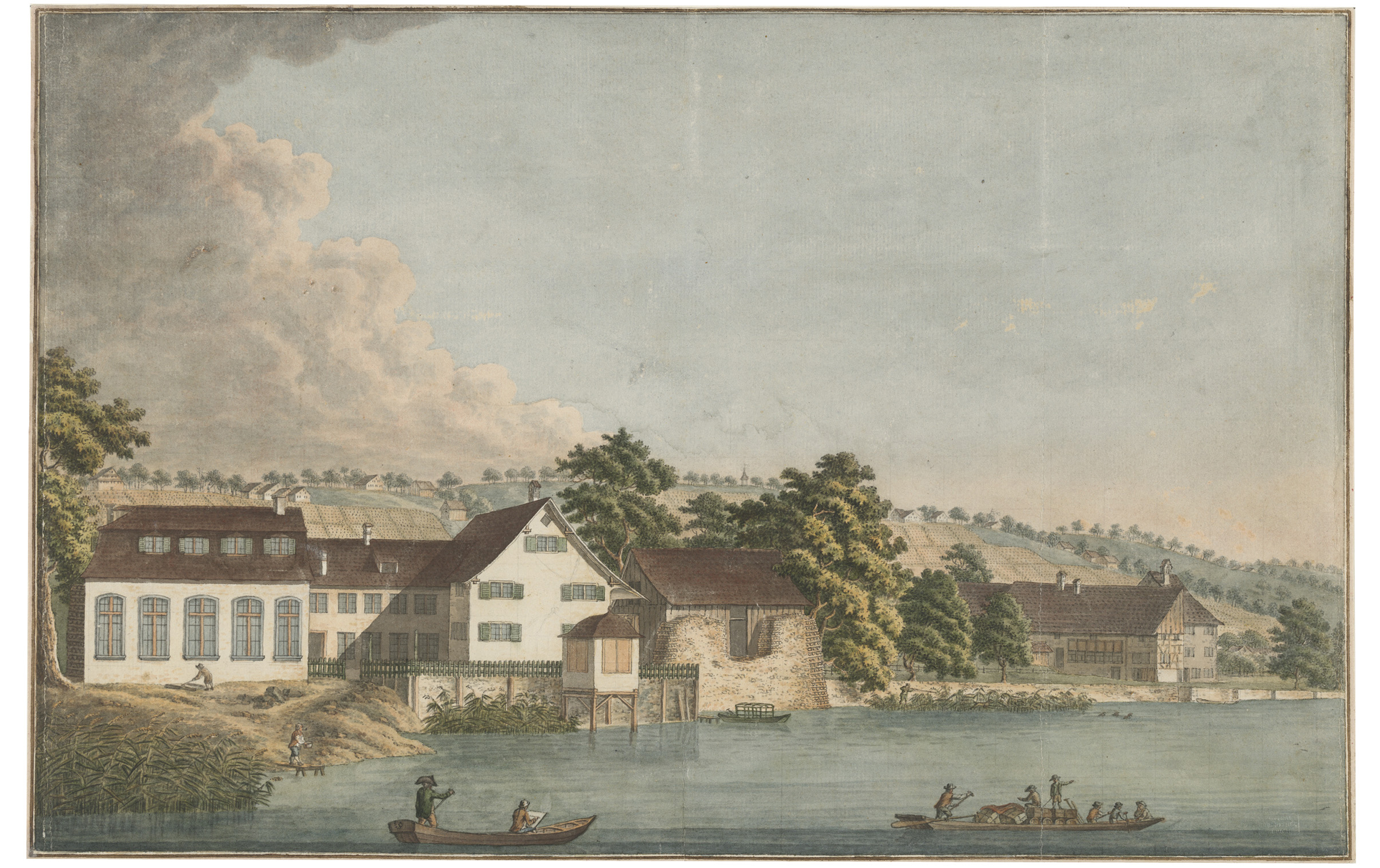 Porzellanmanufaktur Kilchberg ZH, Schweiz